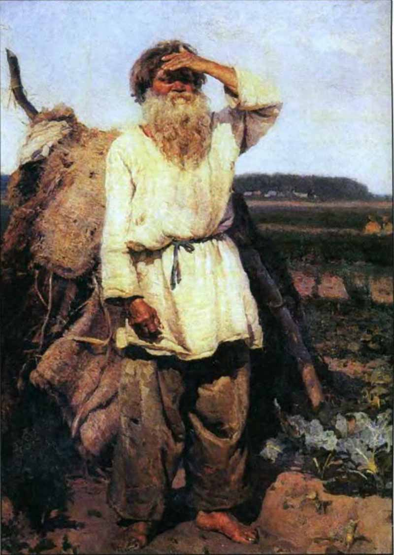 Василий_Иванович_Суриков._Старик-огородник._1882.jpg